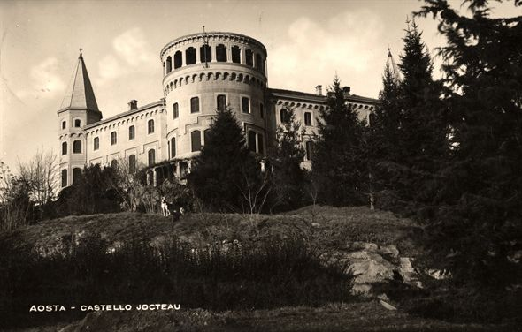 Castello Jocteau (Aosta, Valle d'Aosta, Italia) in una cartolina degli anni '30.